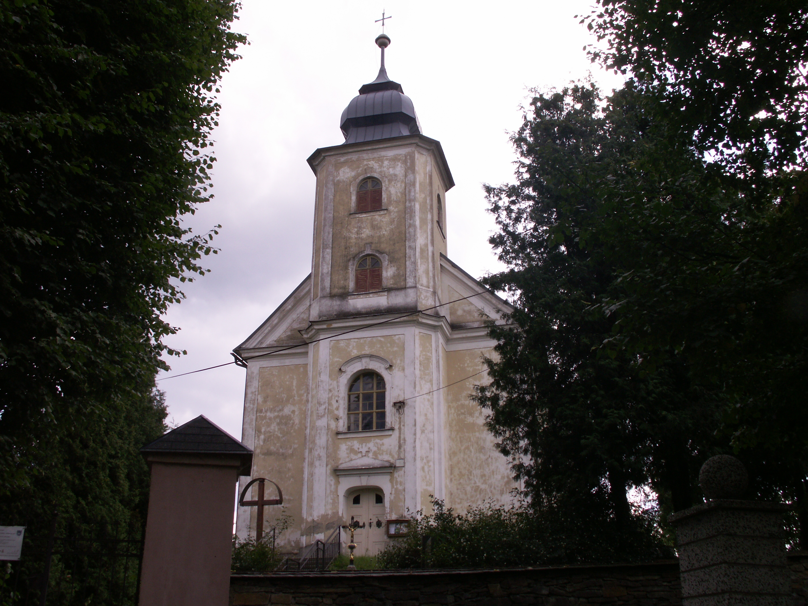 Václavov u Bruntálu, okres Bruntál, Moravskoslezský kraj, kostel Neposkvrněného početí Panny Marie